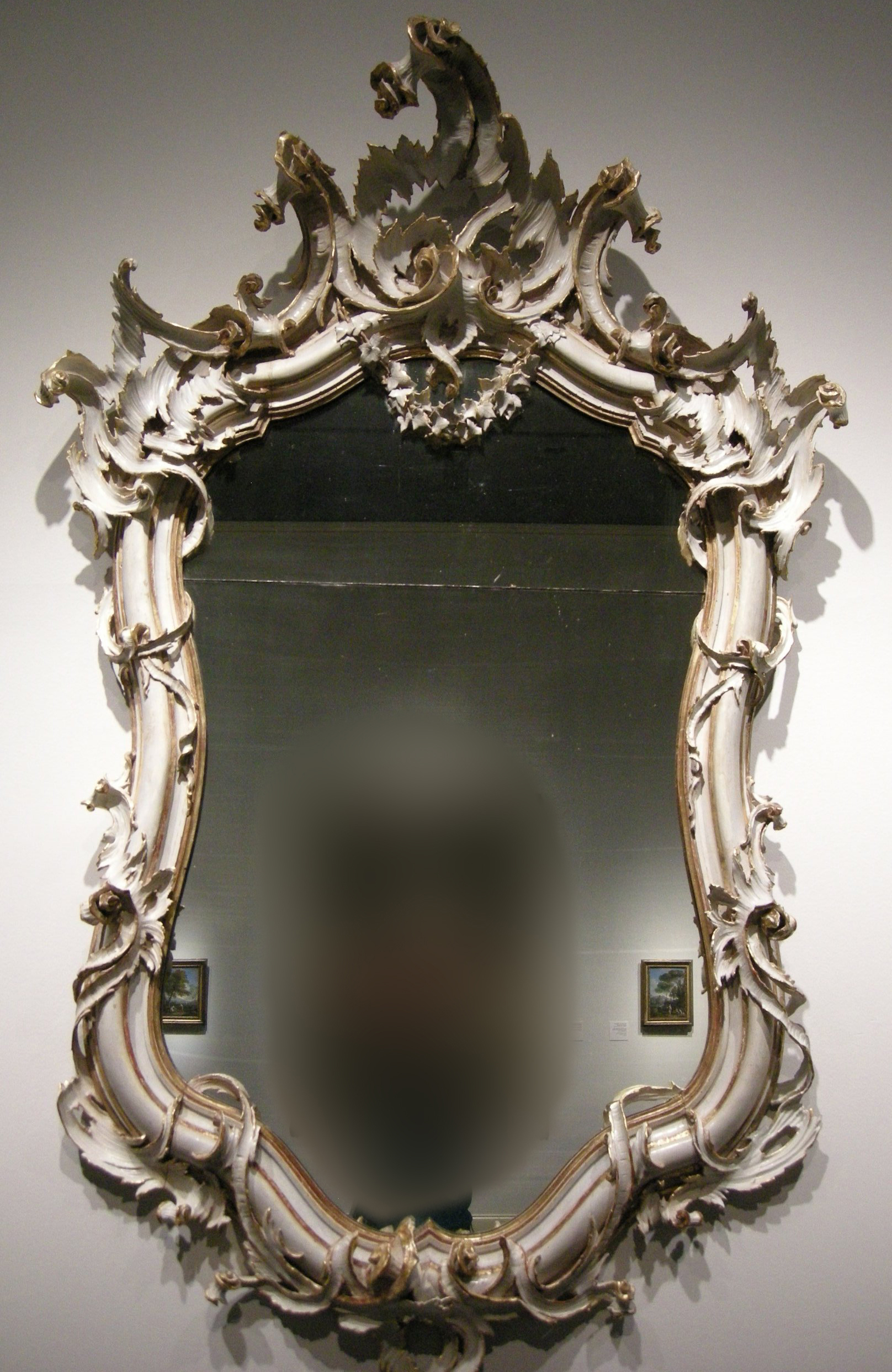 Arte italiana, specchio, 1760 ca